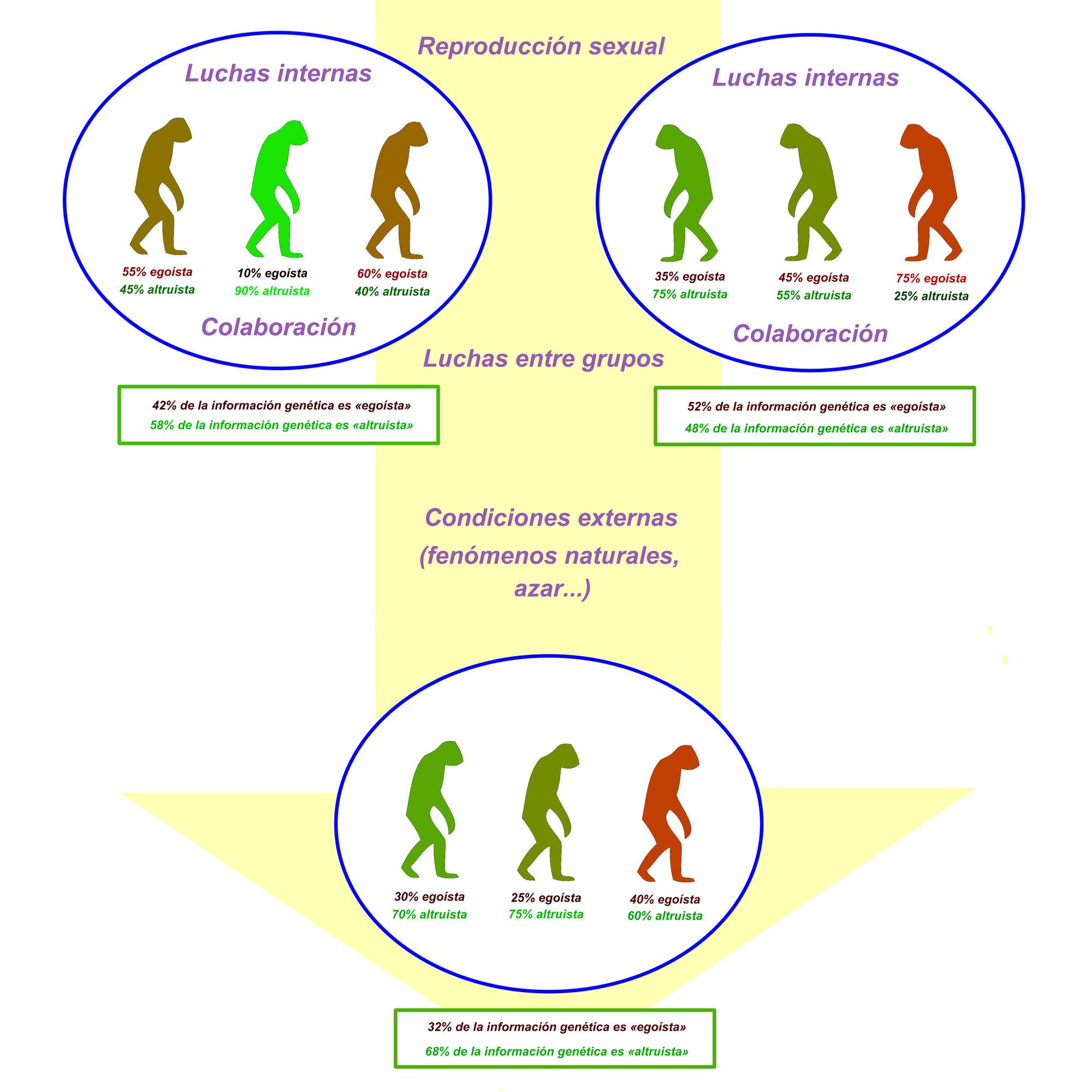 Representación simplificada de la teoría de Dawkins acerca del «egoísmo» de la información genética. Tanto los genes que producen conductas egoístas como los que producen conductas altruistas son en sí mismos «egoístas», compitiendo entre sí y con los de otros individuos. Una vez alcanzado cierto grado de organización, la información genética que produzca un fenotipo egoísta será a la larga desventajosa para el grupo de individuos y contra otros grupos, mientras que la que produzca un fenotipo altruista (de egoísmo altruista en realidad) será ventajosa. Como consecuencia, la «ley natural del más fuerte» entre las unidades genéticas, que a diferencia de los individuos, actuarán de forma irracional, producirá inevitablemente una mayoría de individuos altruistas. La selección natural provocará un aumento del componente genético altruista en los individuos, que, en última instancia, garantizará de forma indirecta la supervivencia de dichos genes.